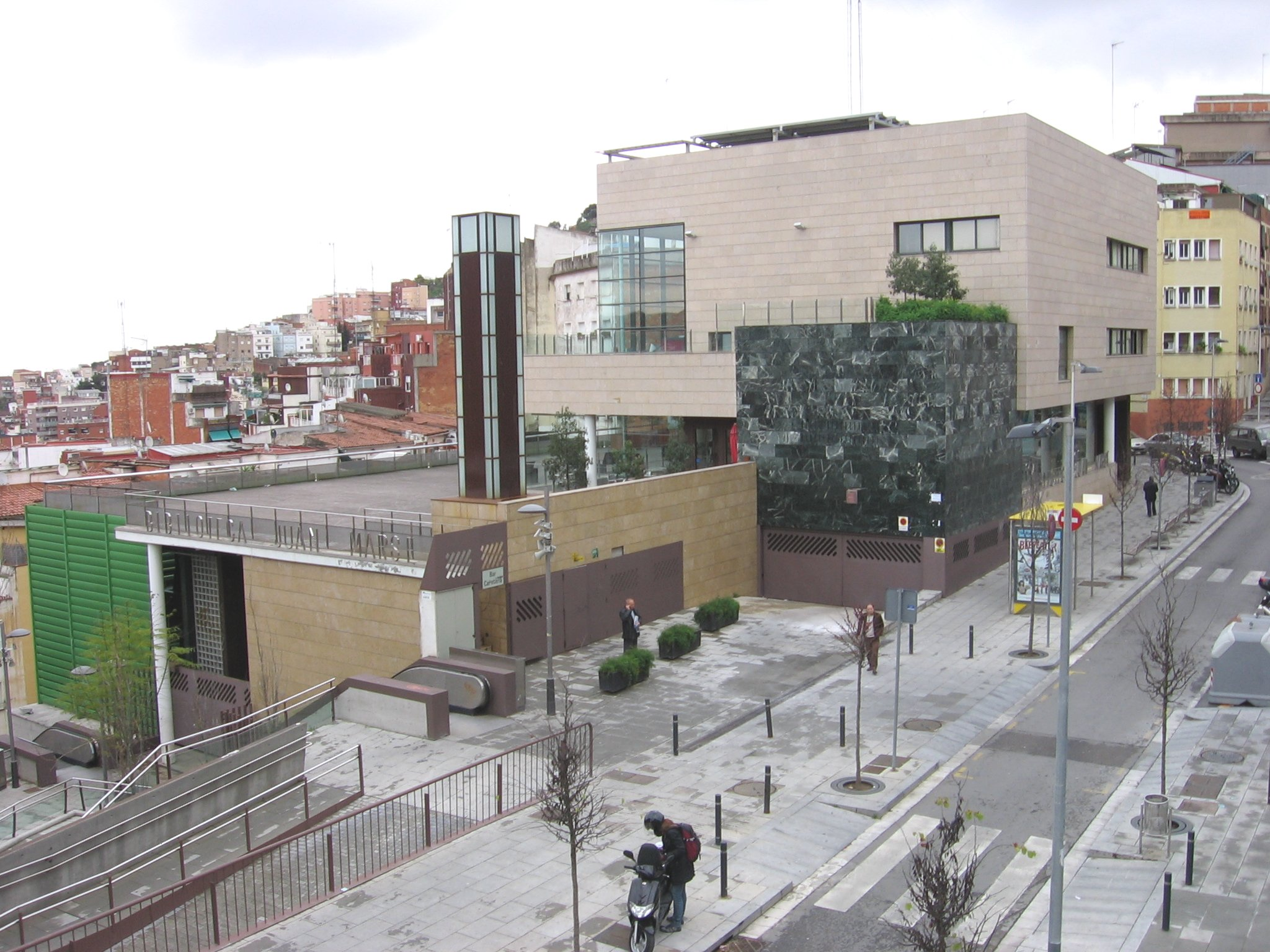 Biblioteca El Carmel-Juan Marsé, barrio del Carmelo, distrito de Horta-Guinardó (Barcelona).